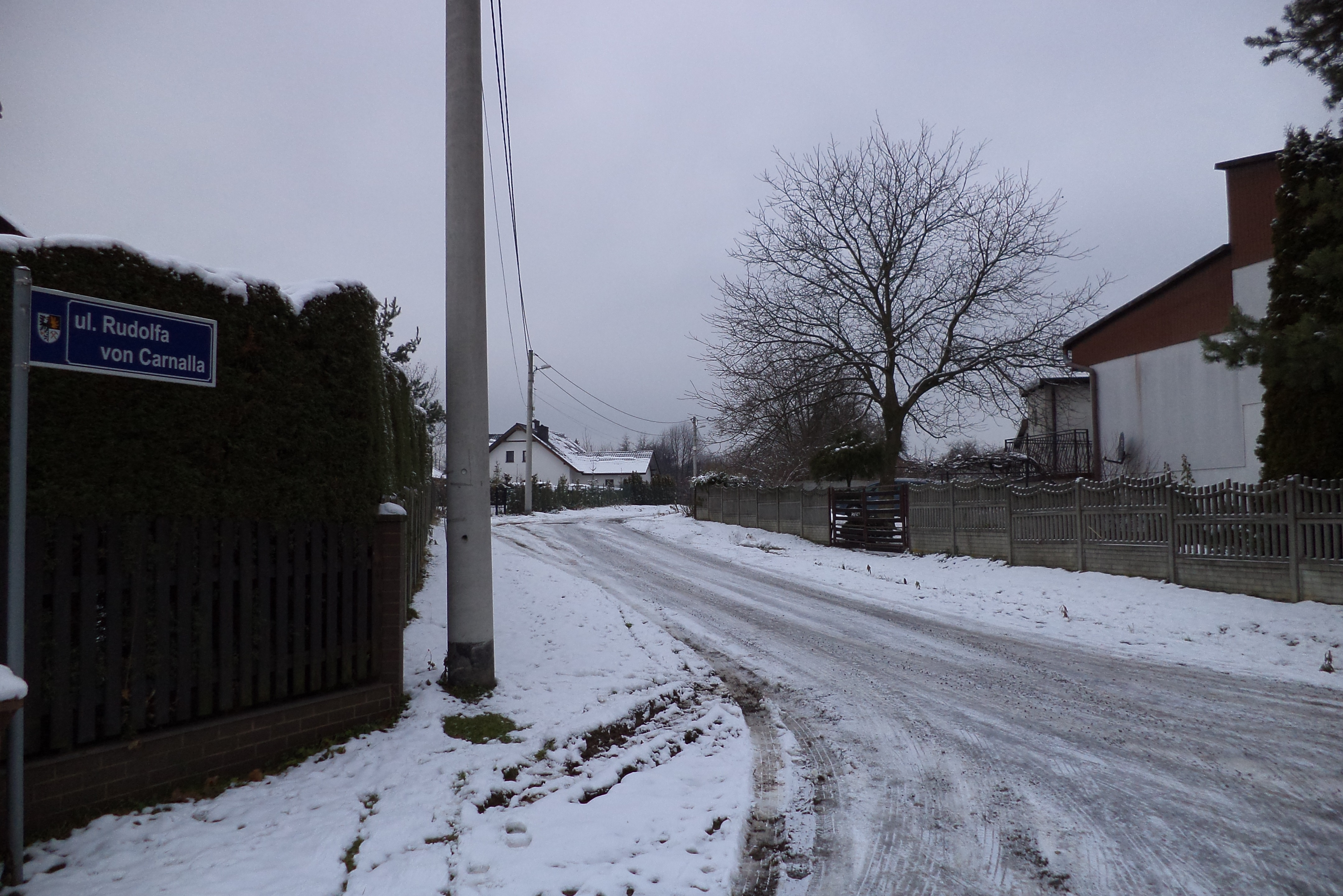 Ulica Rudolfa von Carnalla w Tarnowskich Górach